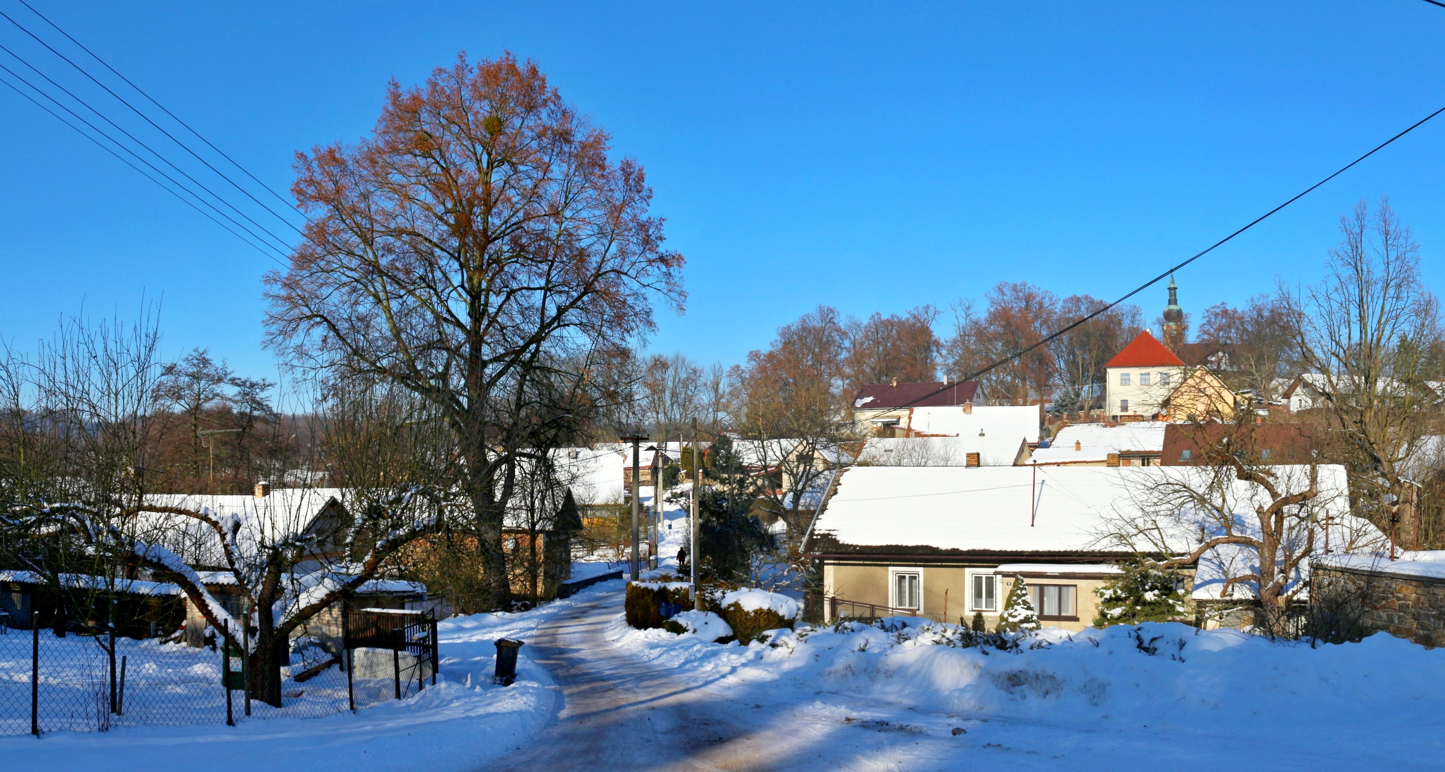 Úžice